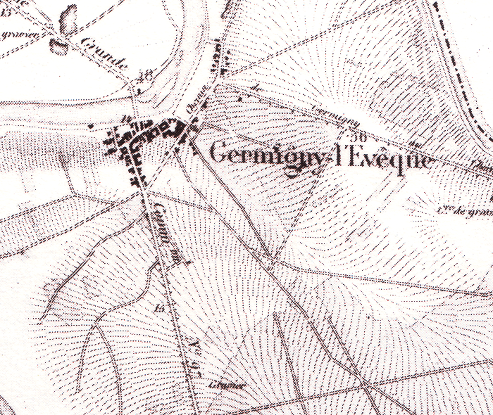 Carte de la commune datant de 1883 (extrait de la carte du canton de Meaux de 1883)